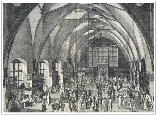 Vladislavský sál na Hradčenach Praha, rytina Jilji Sadeler 1607